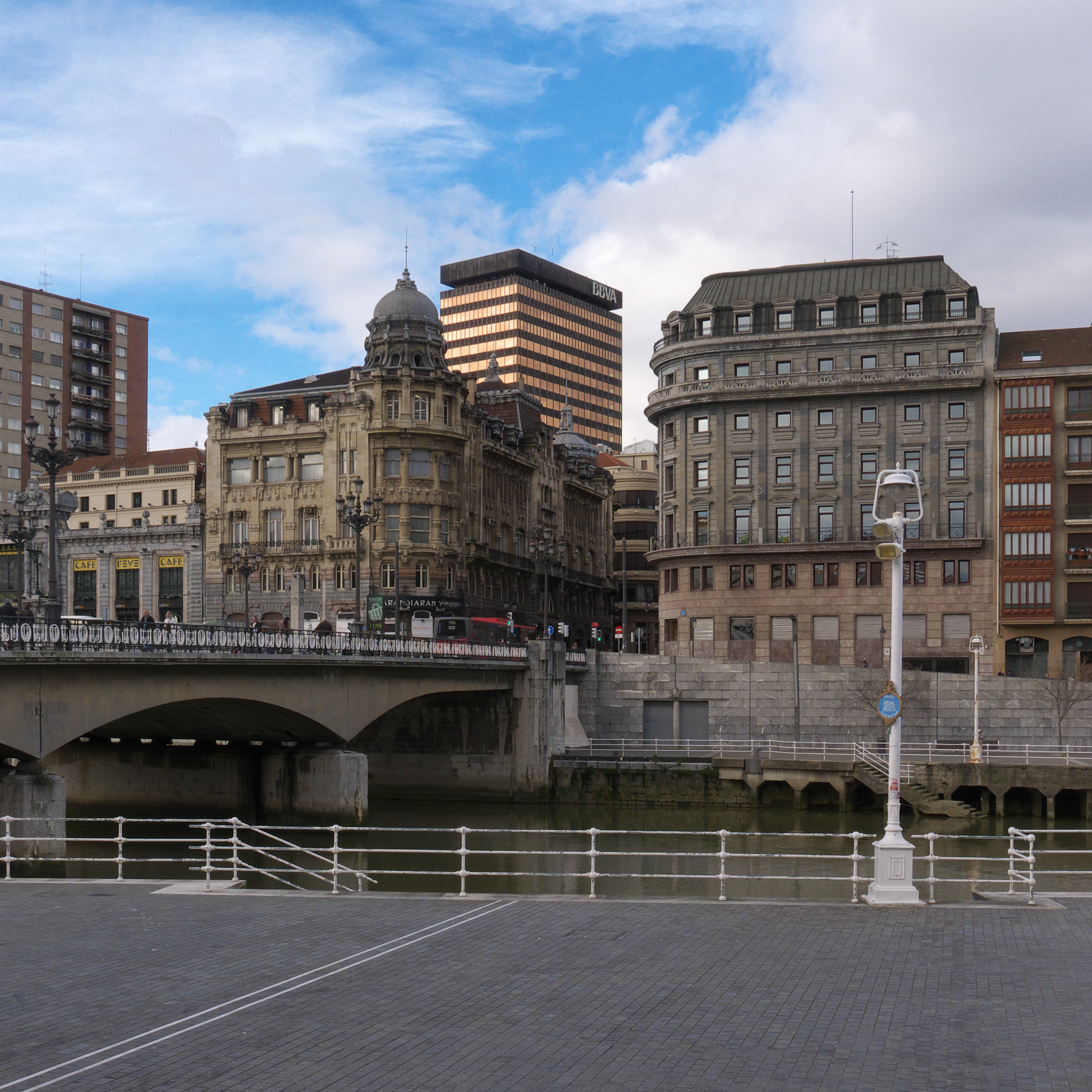 Se observan los edificios de la Sociedad Bilbaina y de la Sede del Metro.